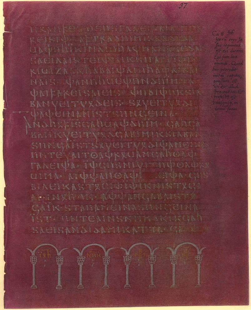 John 8